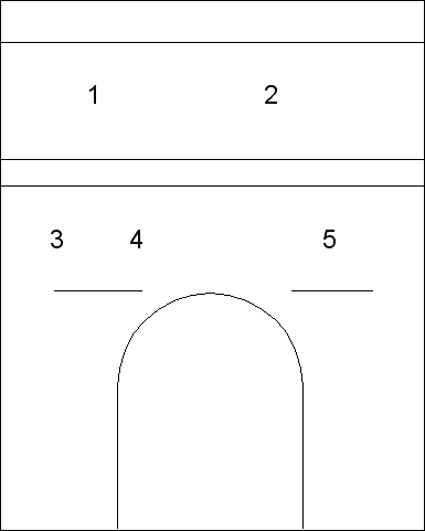 Disposition des fresques sur le mur sud du chœur de l'église Saint-Martin de Vic